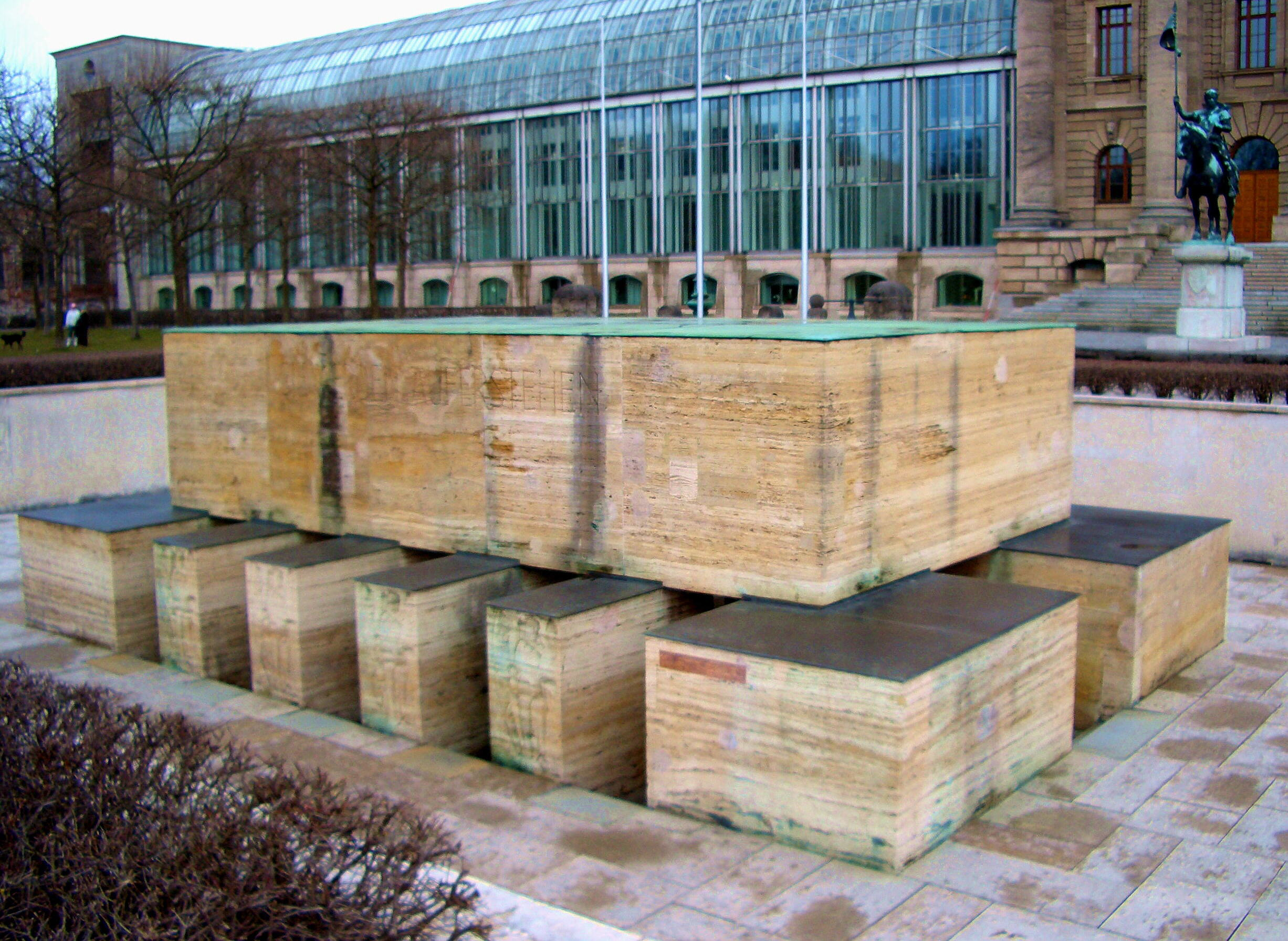 Kriegerdenkmal im Hofgarten München Vorraum und Gruft